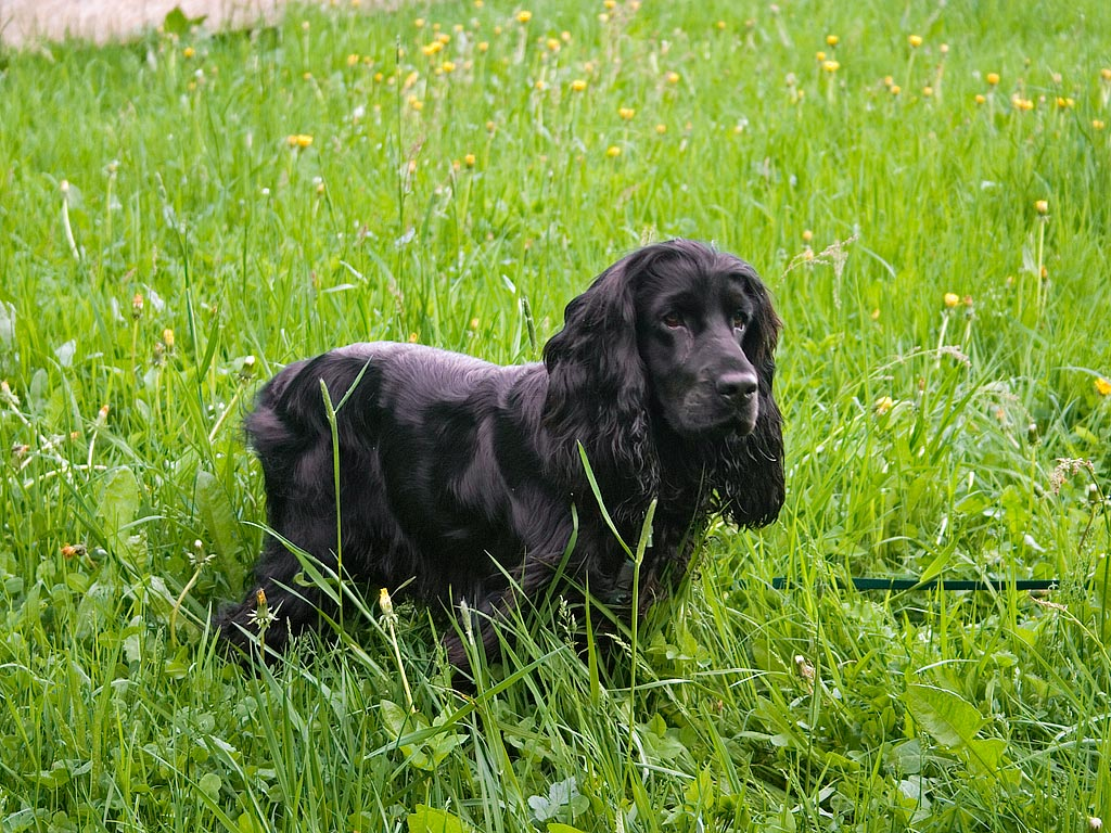 English Cocker Spaniel "Max" Author: Adam Kumiszcza